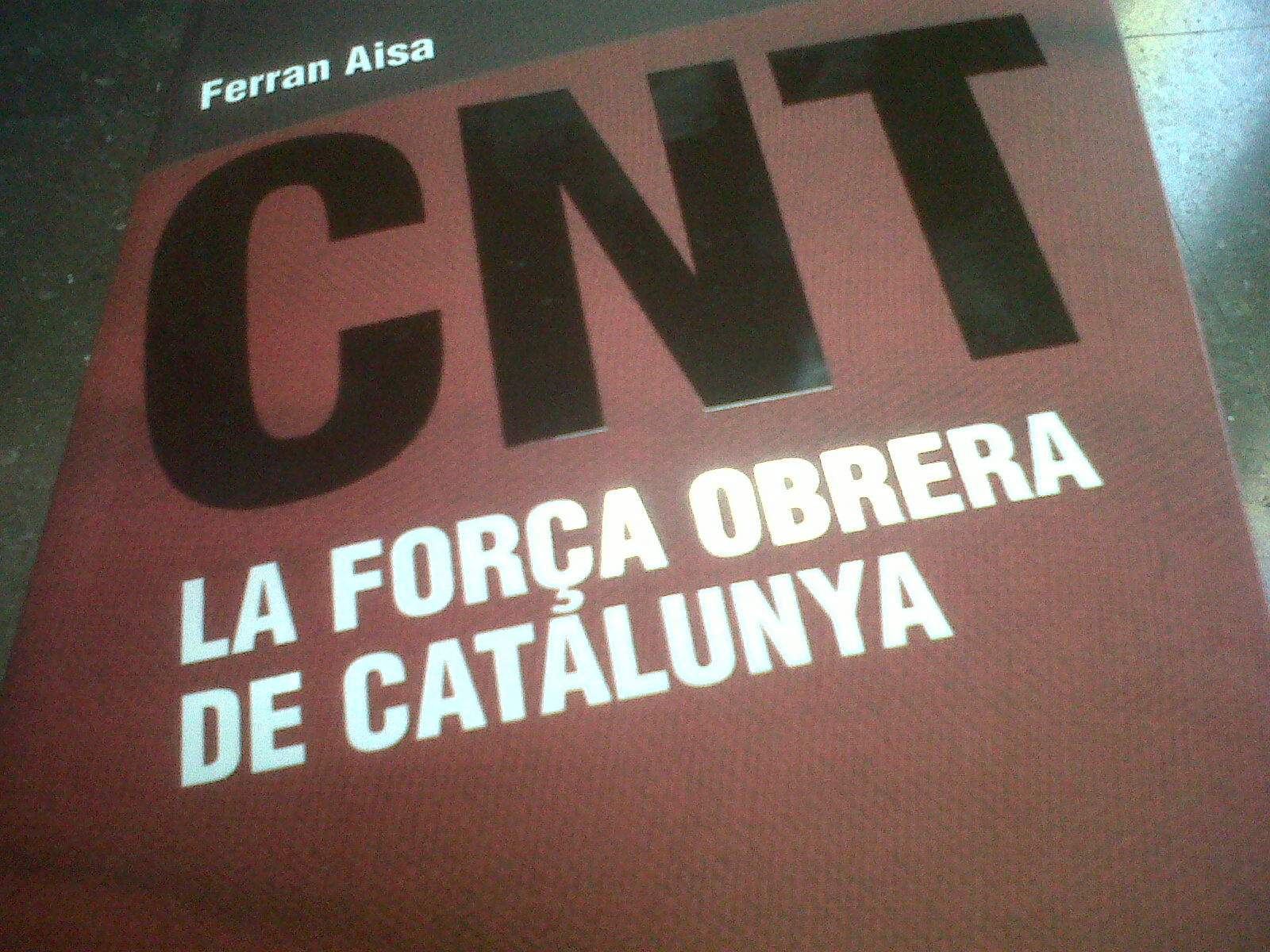 Llibre de Ferran Aisa